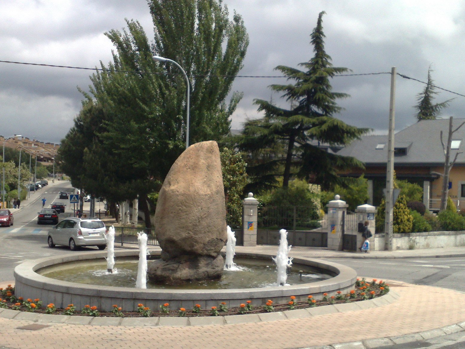 Torrelodones. Rotonda del Dedo Gordo.